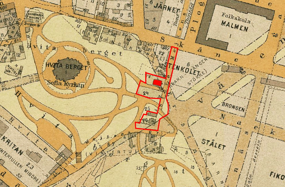 Karta över Vita bergen med planerade men ej utförda gaturegleringar. Inom röd markering: dagens fastighet Stenkolet 2. Missionshyddan är den röd utfyllda byggnaden.